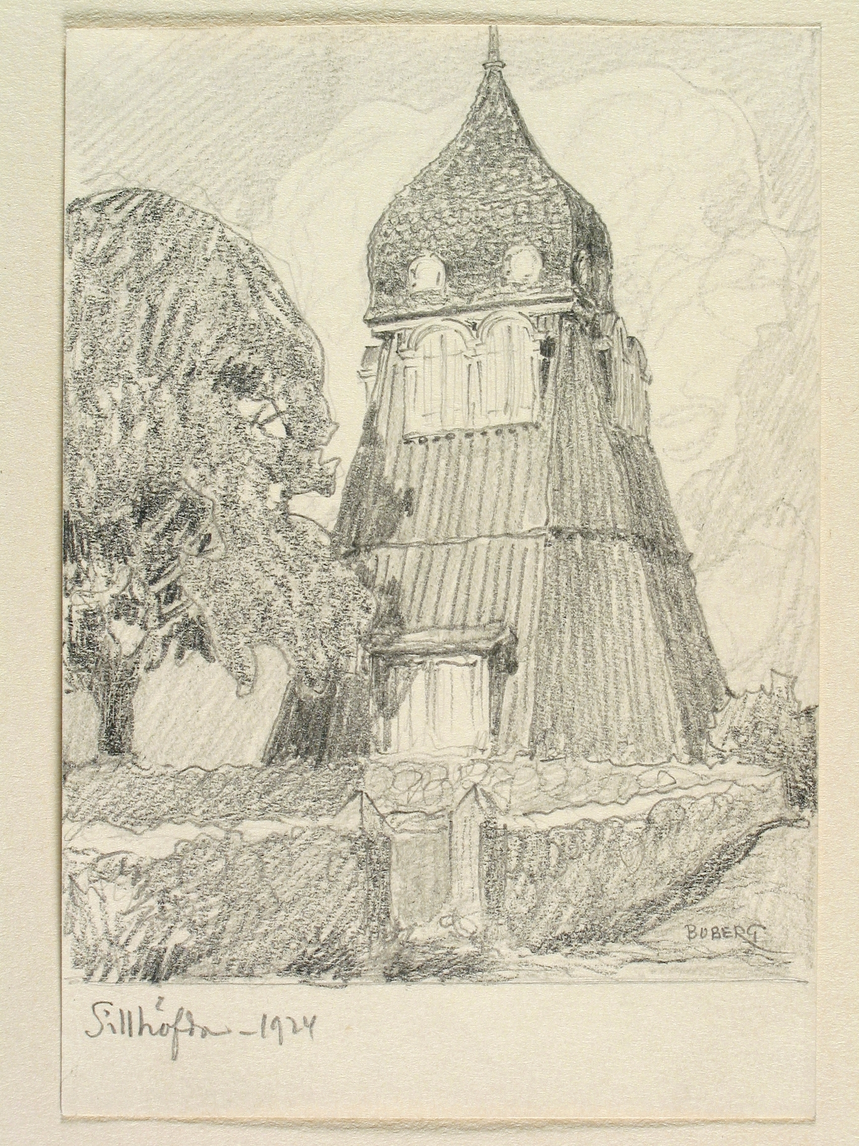 Blekinge, Sillhövda kyrka, klockstapeln. Teckning av Ferdinand Boberg Depicted place: Medelstads hd (Härad), Q10667826 (Q10667826)